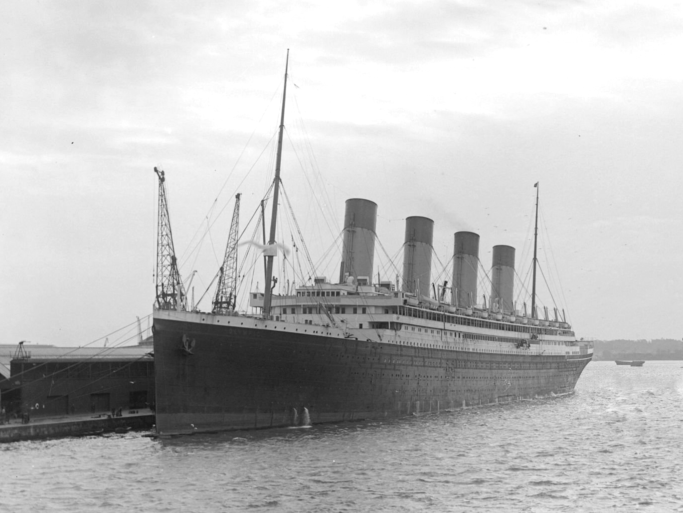 Фотография лайнера "Олимпик" в порту